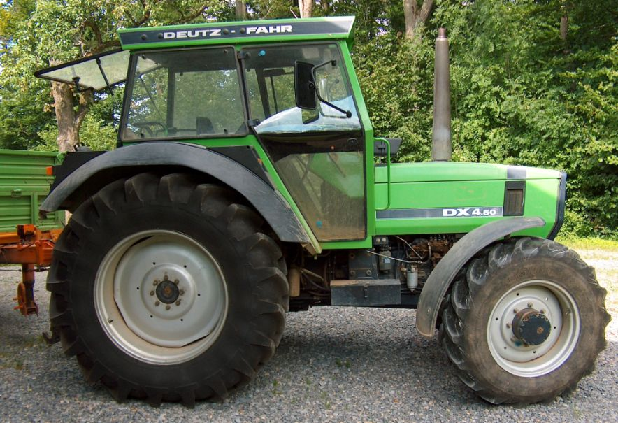 Deutz-Fahr DX 4.50 (Baujahr 1984)